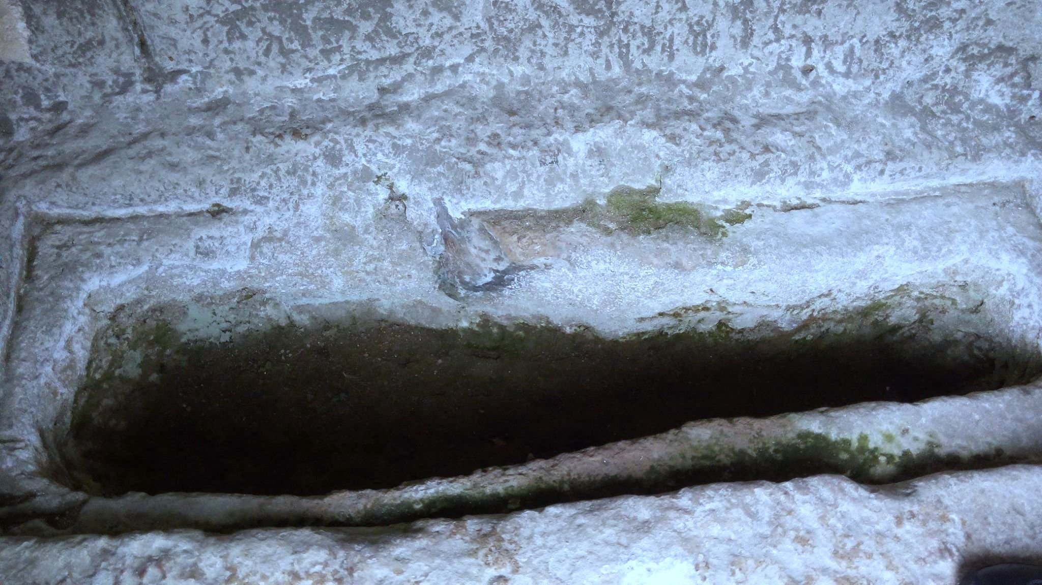 Arheološko područje Rataje - grobnica. Opština Foča.